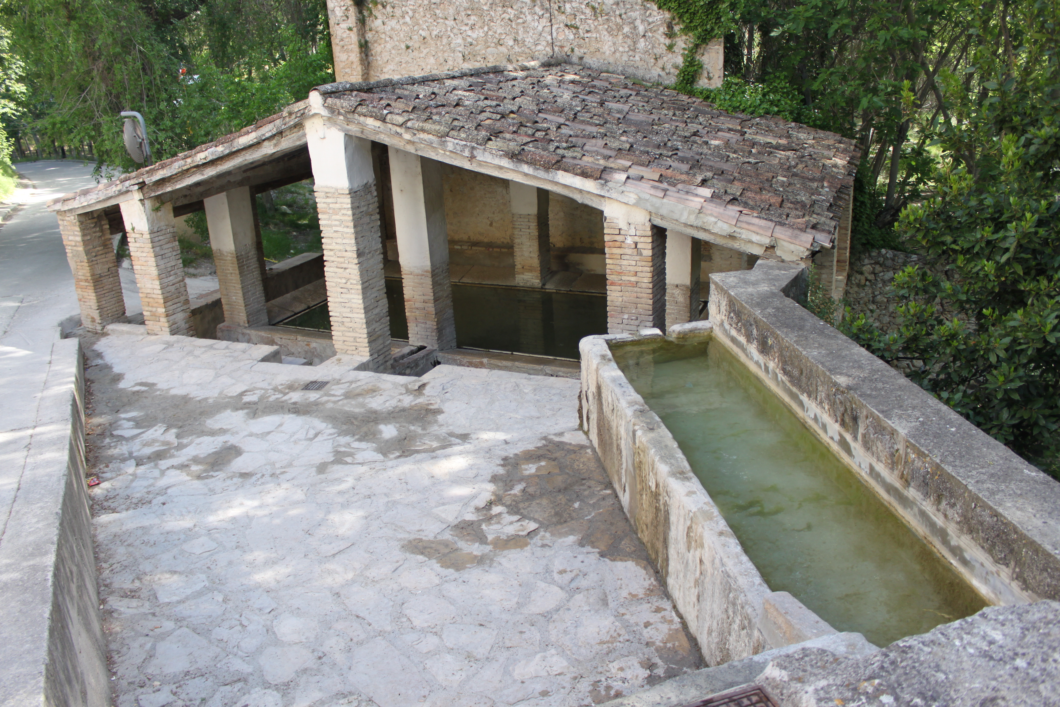 Antiguo lavadero de Planes, Alicante, Comunidad Valenciana, España